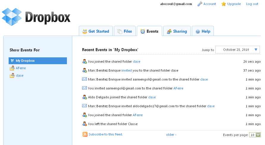 Dropbox